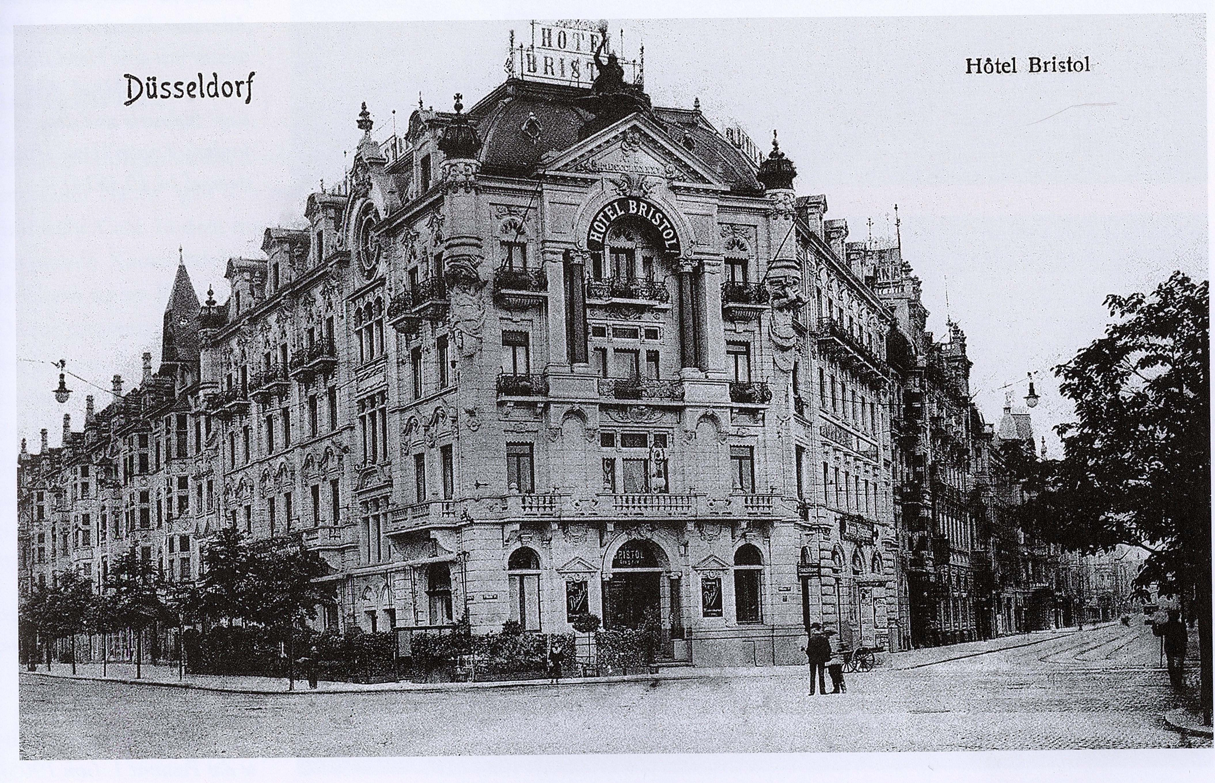 Hotel Bristol, Wilhelmplatz 12 / Ecke Graf-Adolf-Straße (links in Höhe Nr. 112) und Bismarckstraße (rechts)